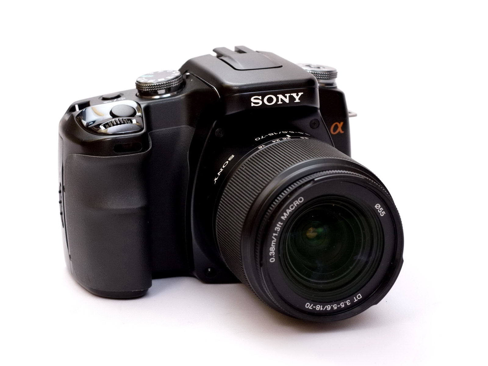 Sony Alpha 100 - Ansicht links vorne